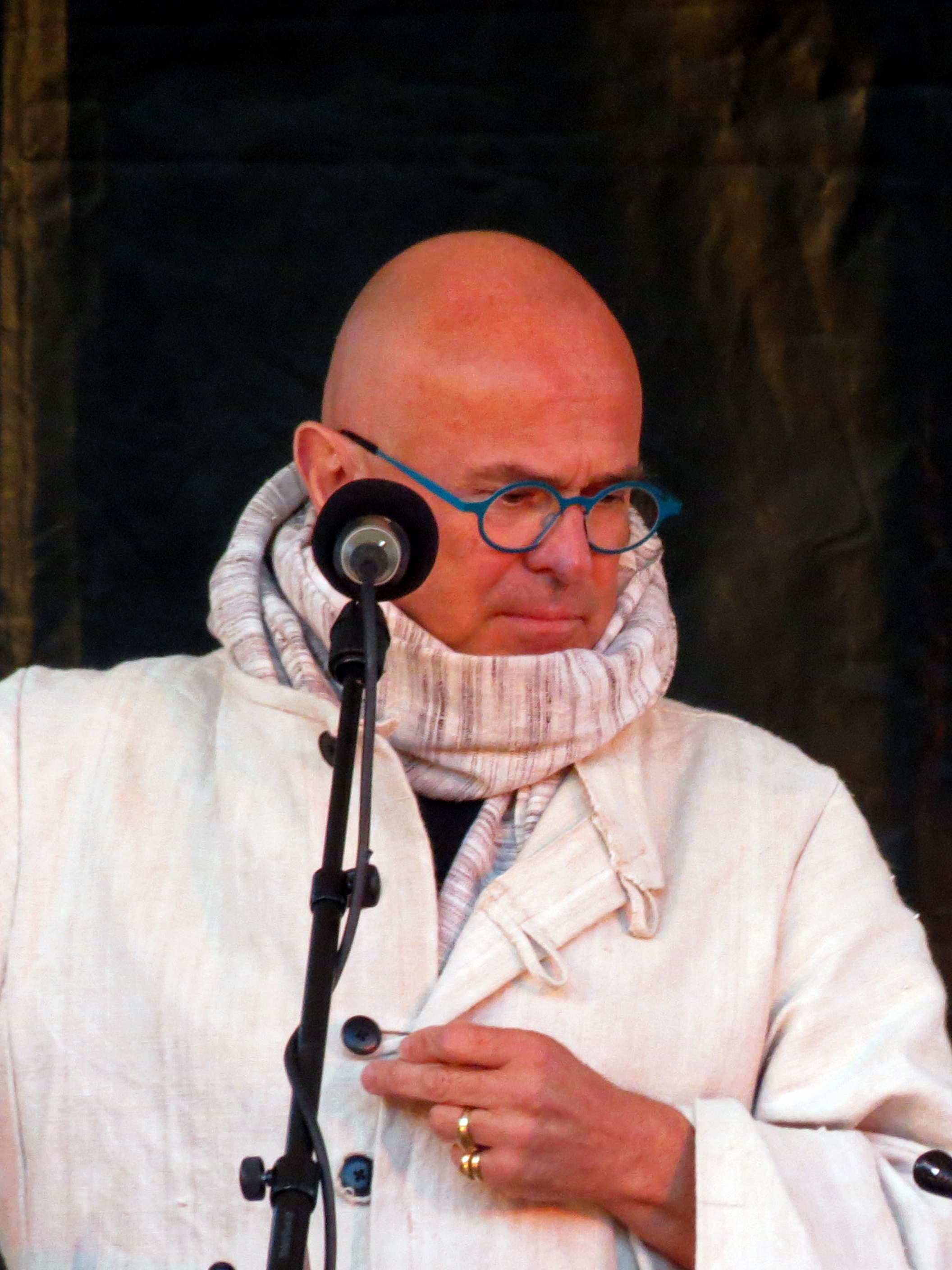 Yann-Fañch Kemener du groupe Barzaz dans le cadre des Festi'Cités de Guérande.